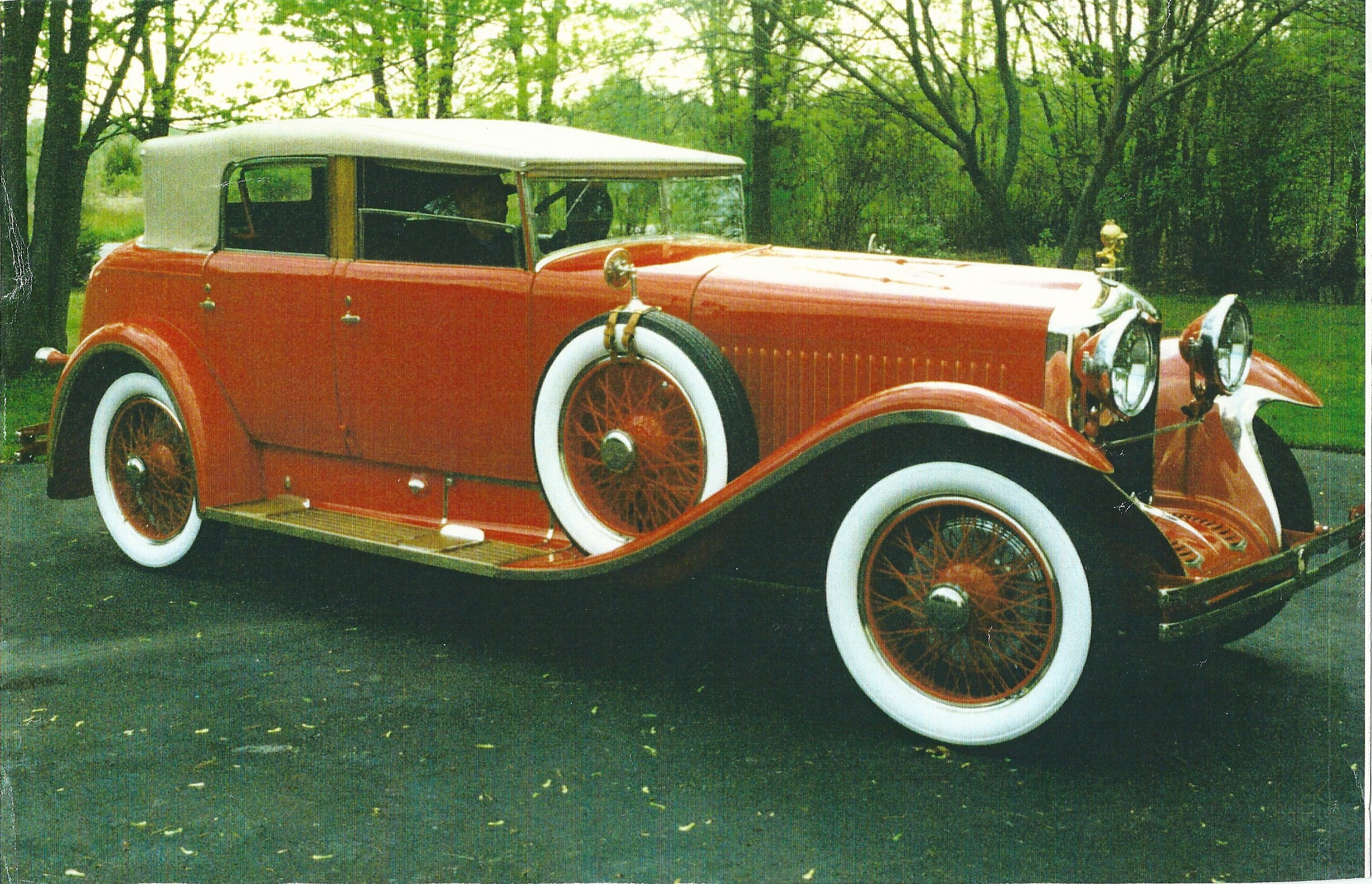 32 pk, Torpedo Transformable